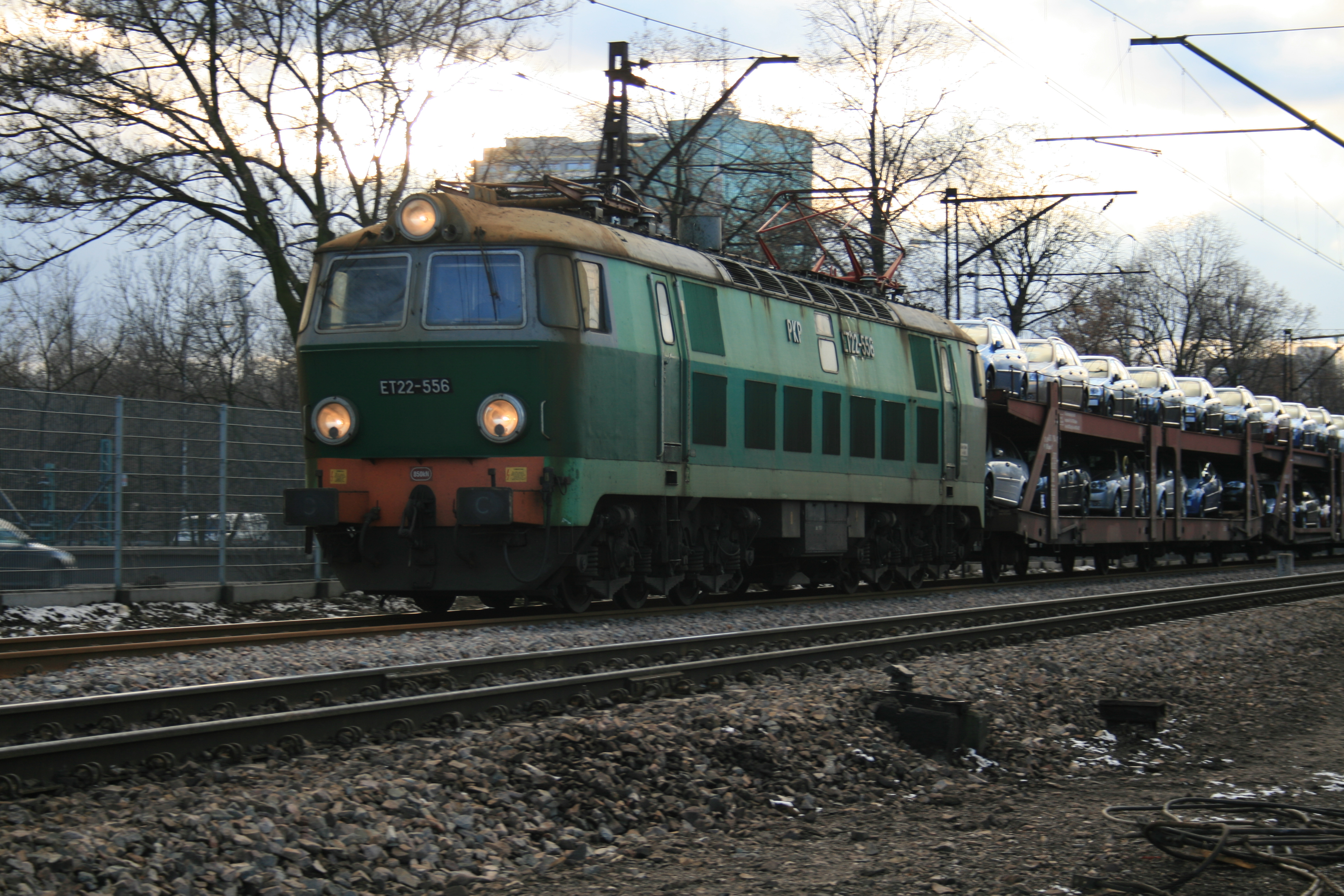 Elektryczna lokomotywa towarowa ET22-556 wjeżdżająca na Most Gdański.